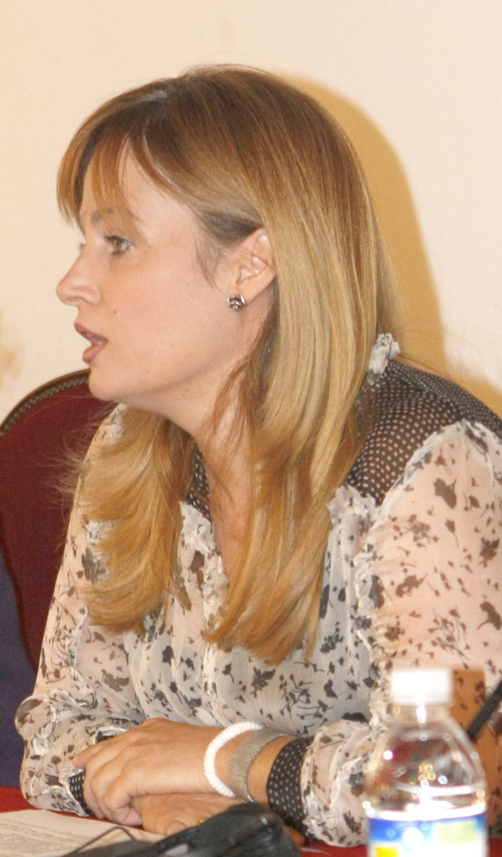 Rosa Peris. Agora 2009. Curso igualdad "Llegar y quedarse" Cáceres